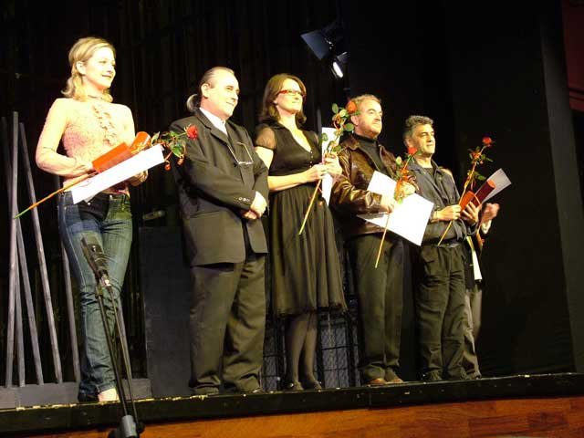 Moja fotografija.